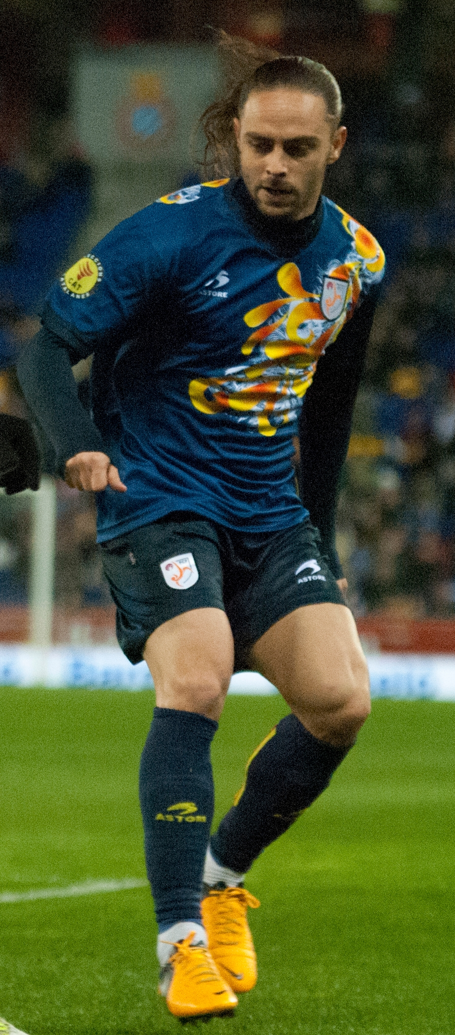 Sergio Garcia, en un partit de la selecció catalana.